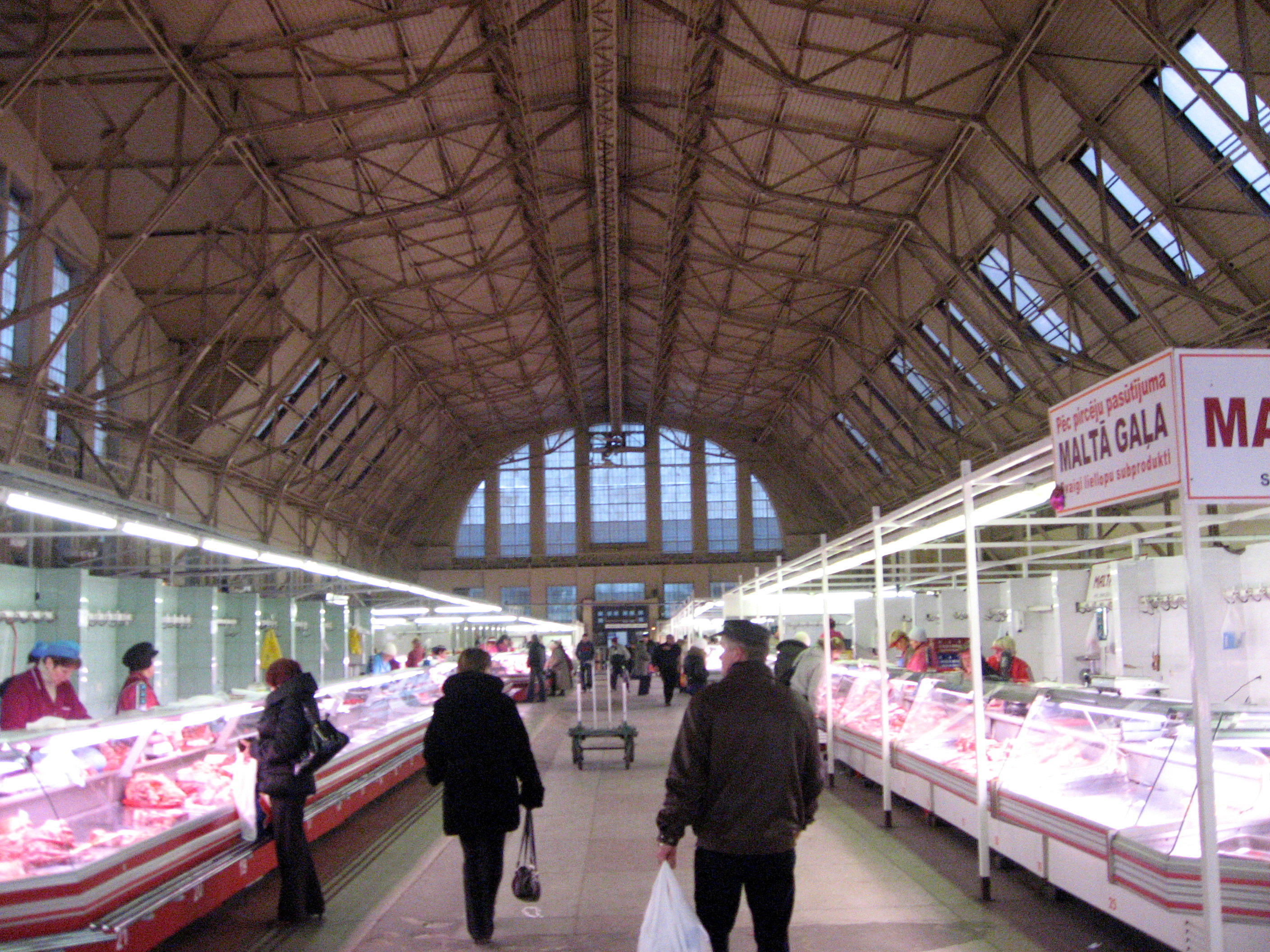 Riga, interiér jedné z budov trhu